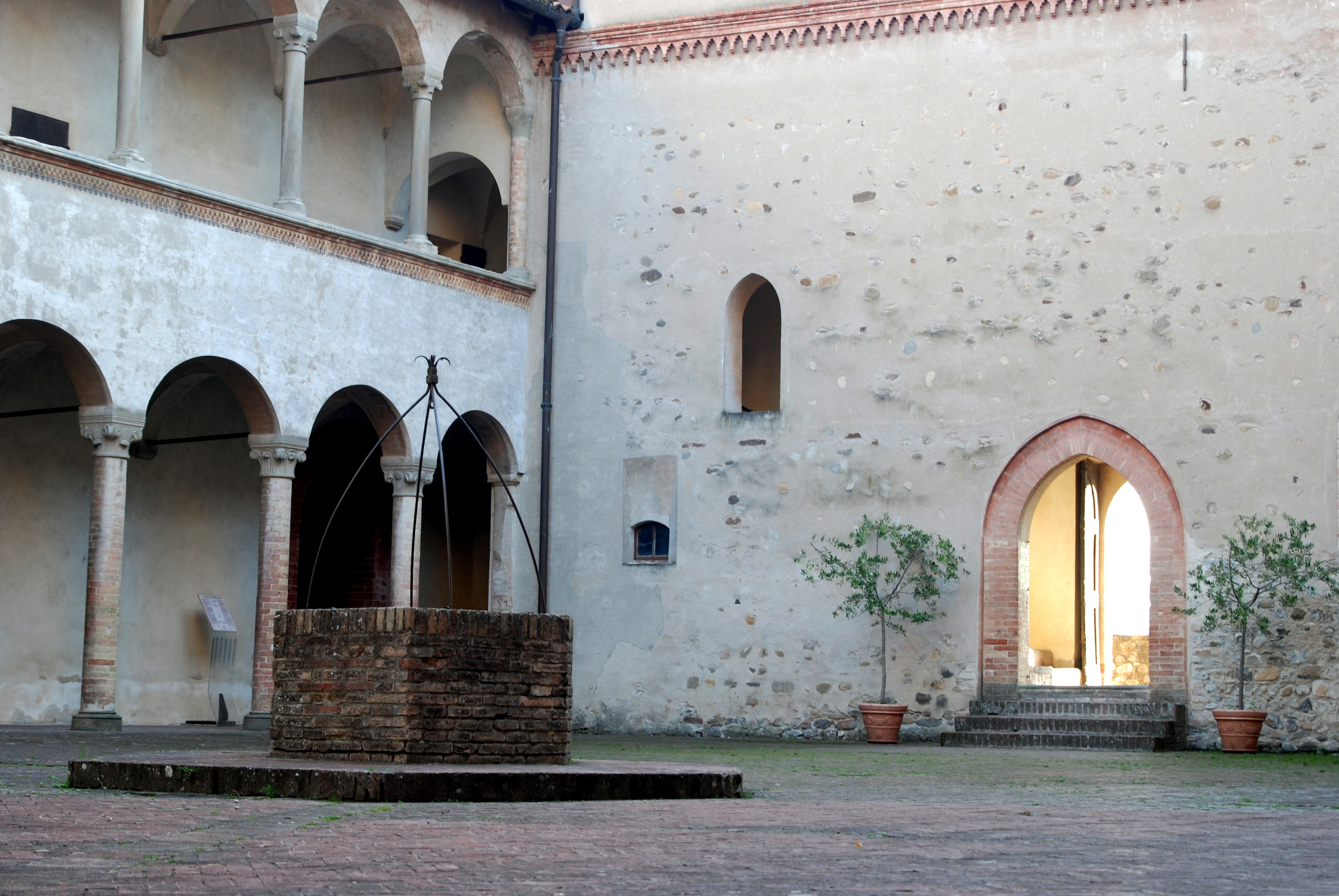 Castello di Torrechiara - MIBAC Cortile interno con il pozzo This is a photo of a monument which is part of cultural heritage of Italy.